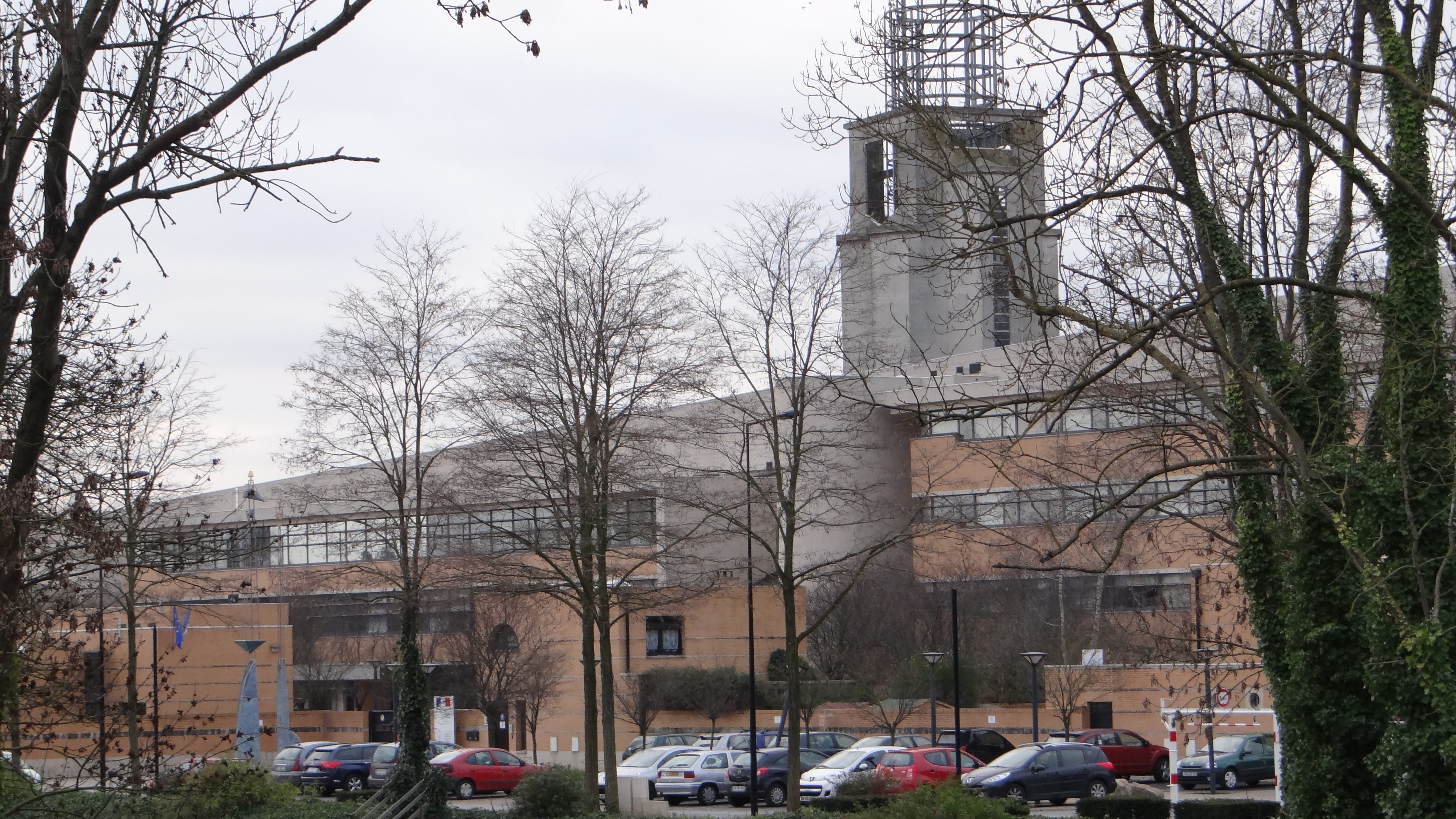 École nationale des techniciens de l'équipement de Valenciennes